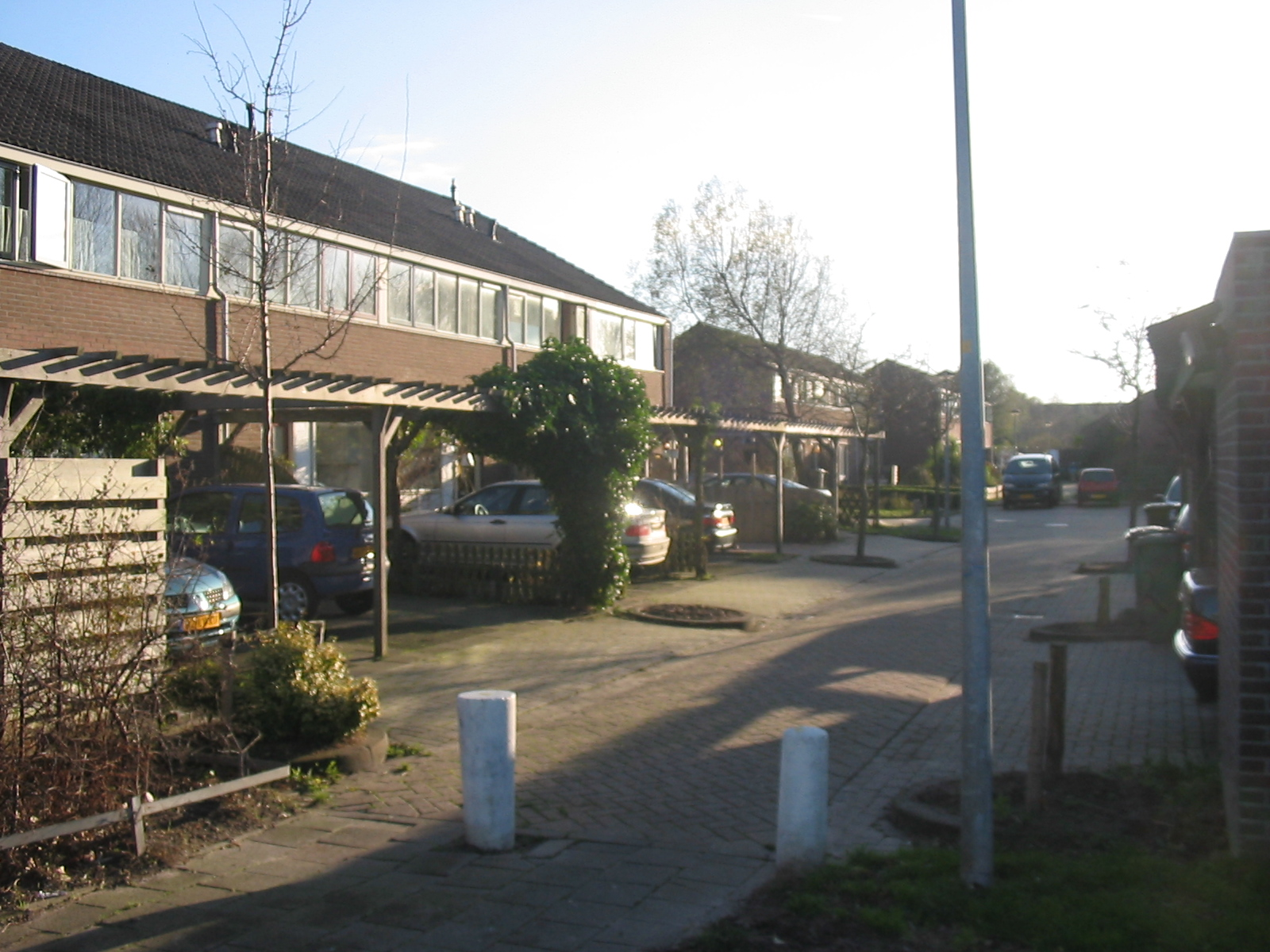 Foto van straat in Middelzand (in november 2006).